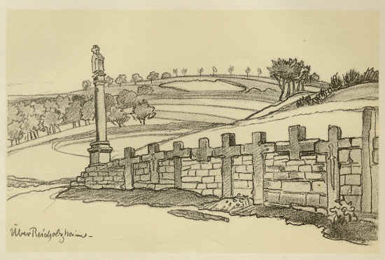 Steinkreuze bei Reicholzheim. Druck von 1925 auf getönter Tafel.